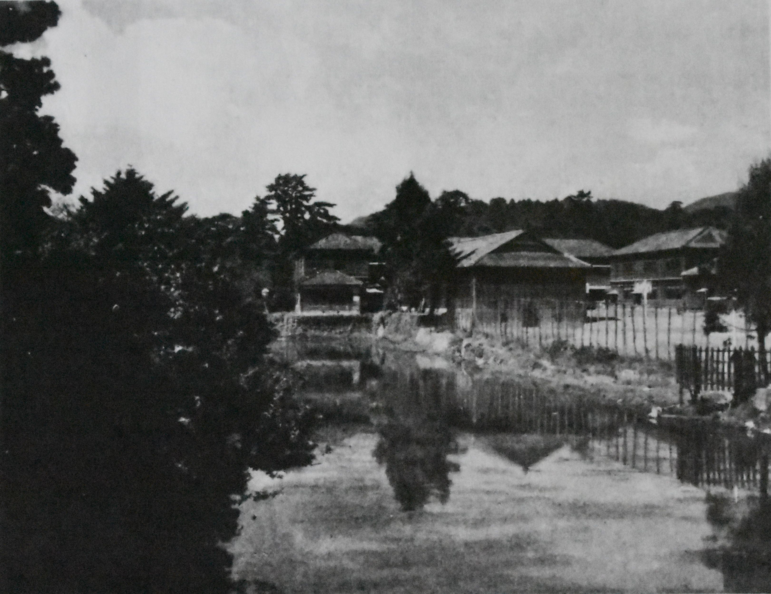 静岡県立静岡商業高等学校